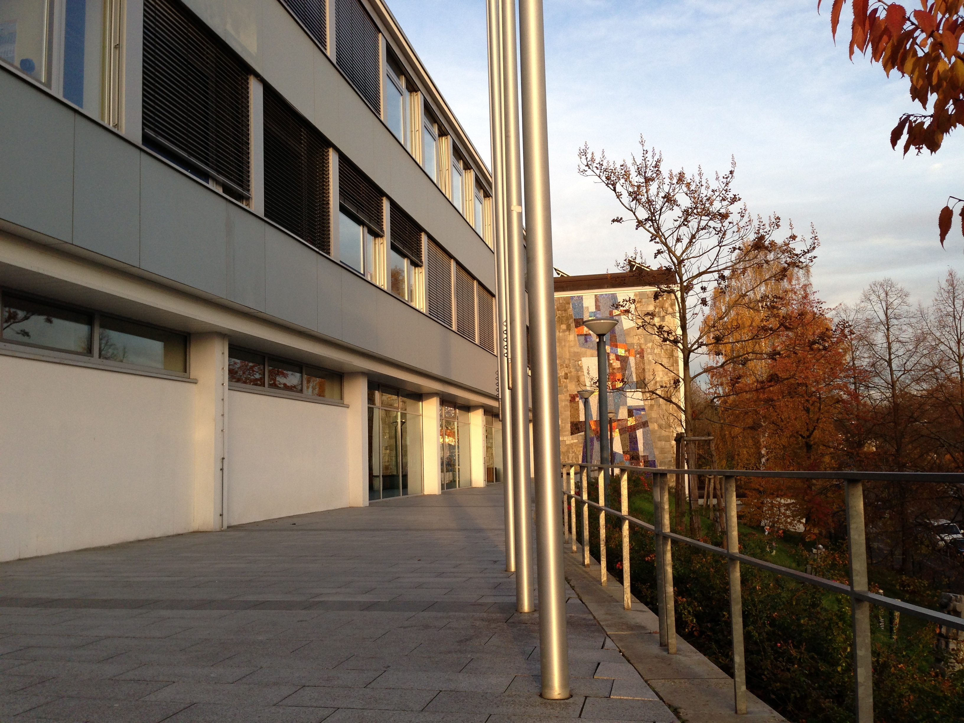 Haupteingangsbereich des Kepler-Gymnasiums Pforzheim.